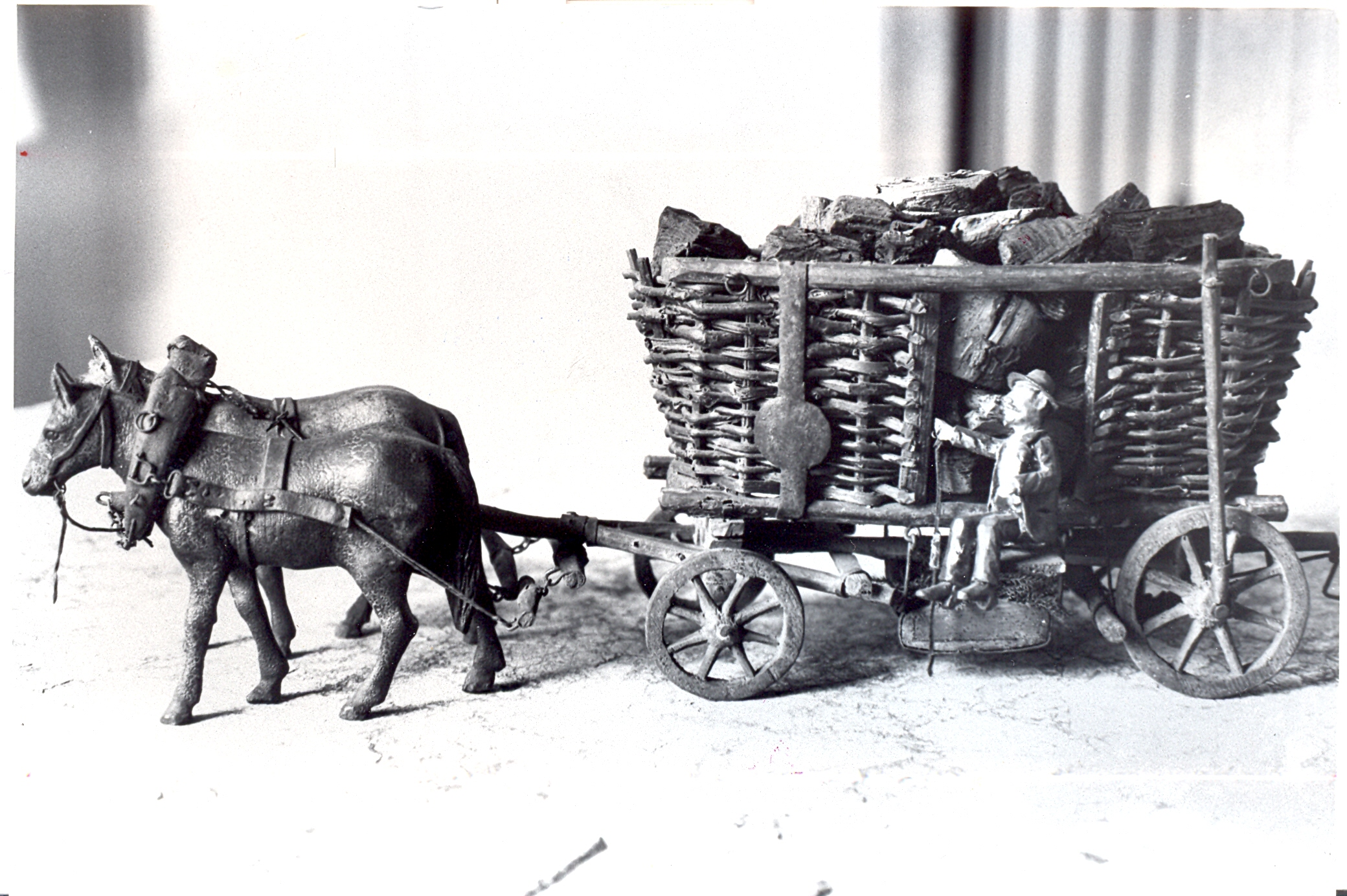 Kohlwagen, zum Transport von Holzkohle